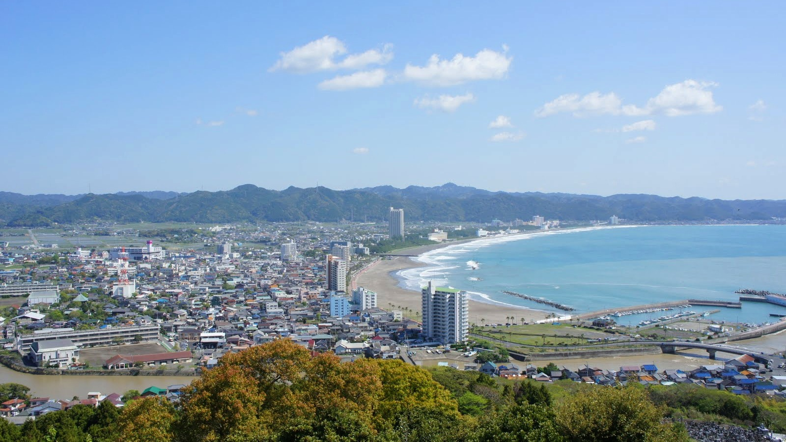 千葉県鴨川市、魚見塚展望台こと誓いの丘にて。高台にあるので、昔は魚群を見つけるのに使っていたのでこの名前、とか。女神の像が建っています。また、誓いの丘、ということで、ここで誓いを立てる人も。誓いを守る約束として、鍵をつけて行く人が多く、辺りは鍵だらけになっています。